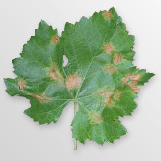 Description Plasmopara viticola, Peronospora. Photographer Marco Bressi